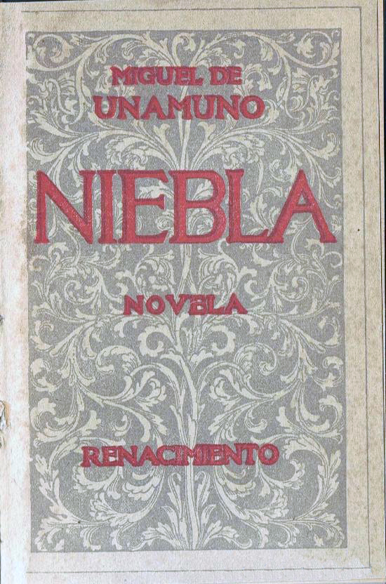 Portada de la primera edición de Niebla (Renacimiento, 1914).